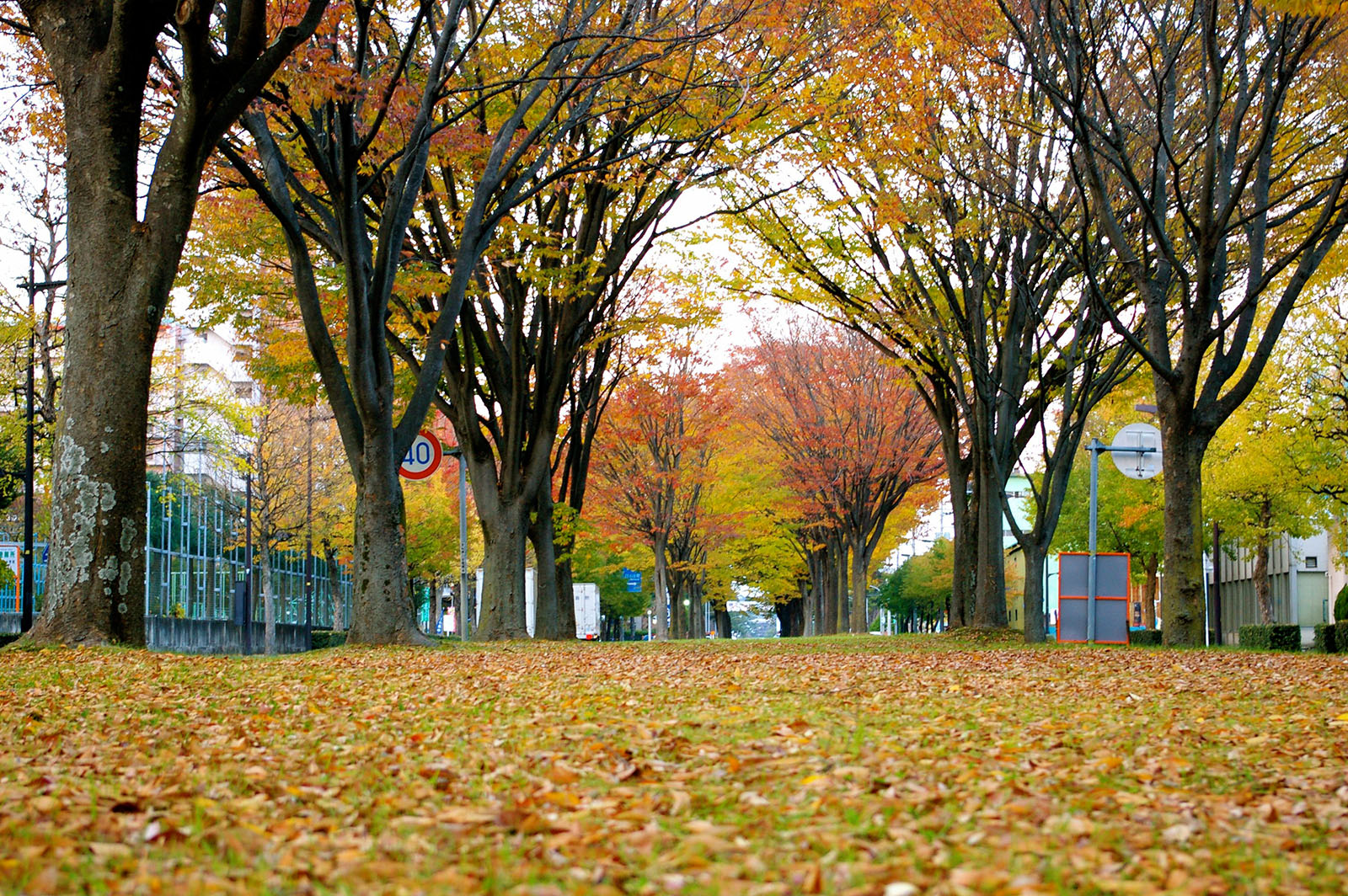 Oroshimachi St. in Autumn.